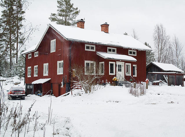 Ett av husen i Åbo i Ljusdals kommun, Sverige